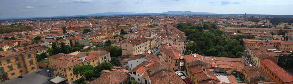 Pisa panorama